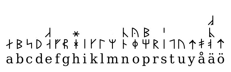 variant av Dalrunor.svg. Jag har tagit bort och lagt till runor för att ge beskriva de dalrunor som är kända under 1500-talet. Från "Dalrunor i Dalarnas museum", Helmer Gustavson